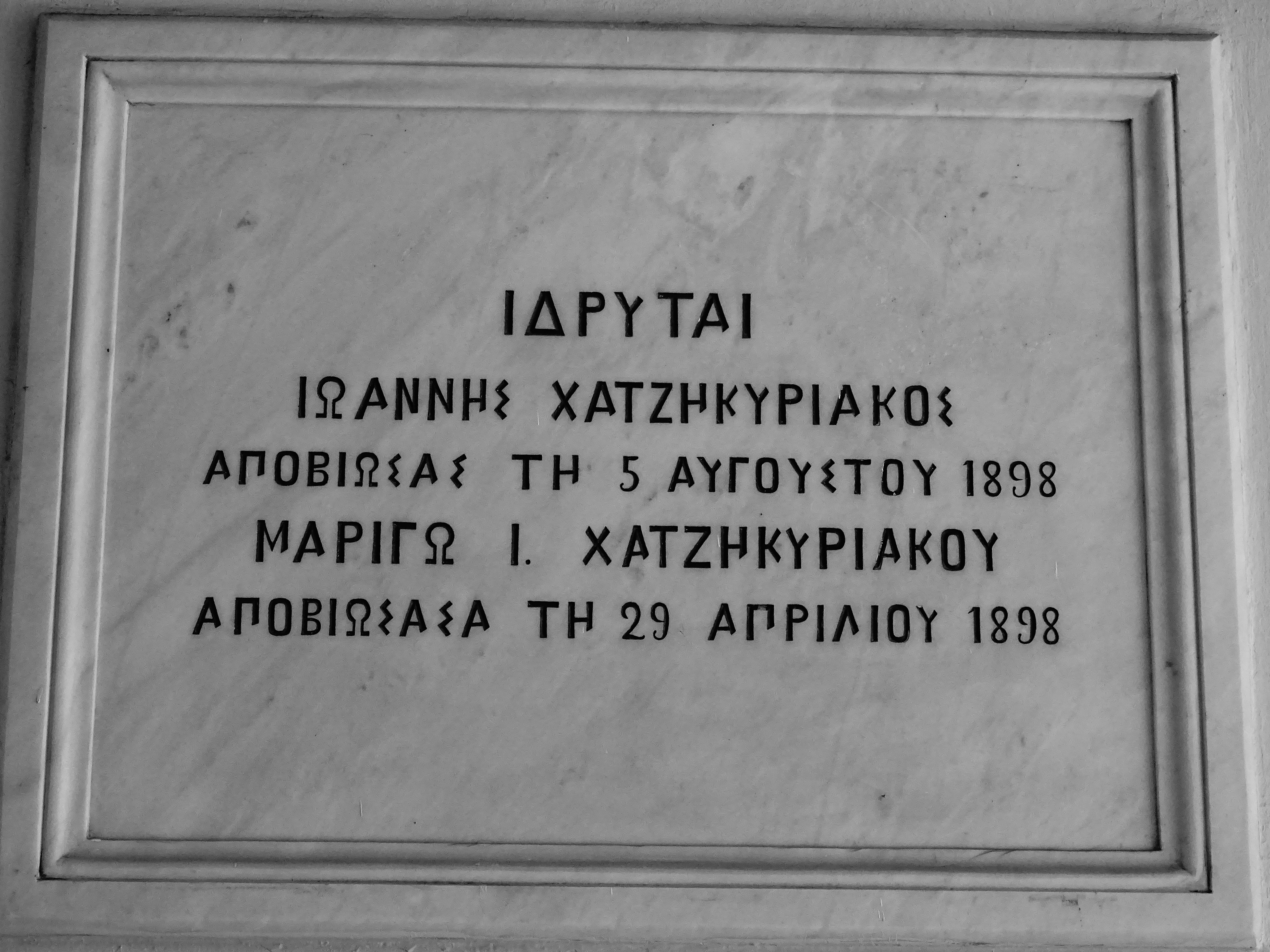 The slab commemorating the founders